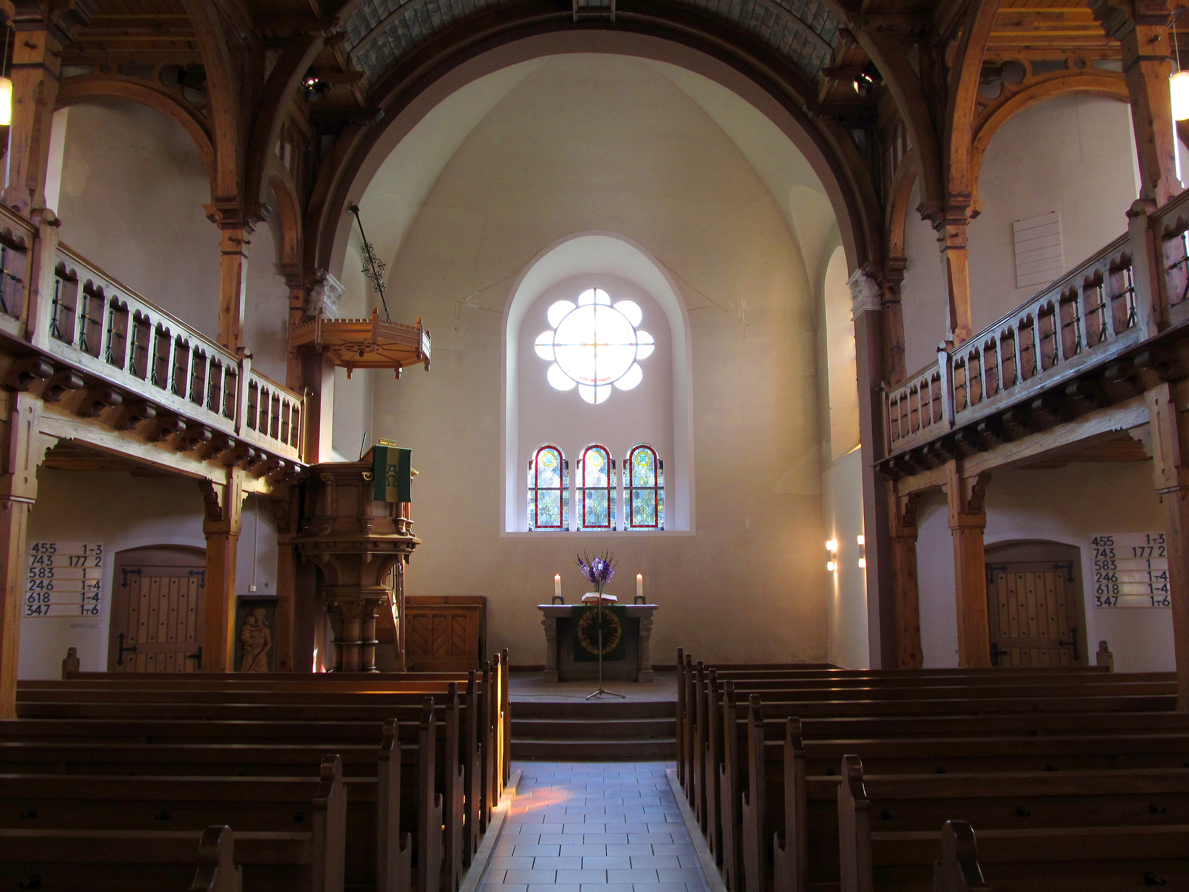 Blick ins Innere der protestantischen Kirche in Bexbach, Saarland